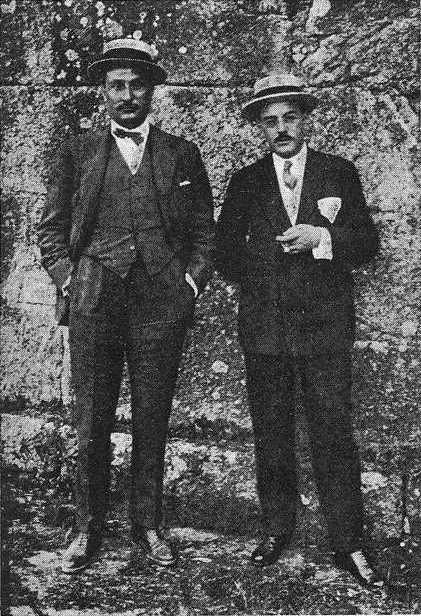 Leonardo Rodríguez e Alfredo García Ramos en Chantada, fotografía en Vida Gallega 1920